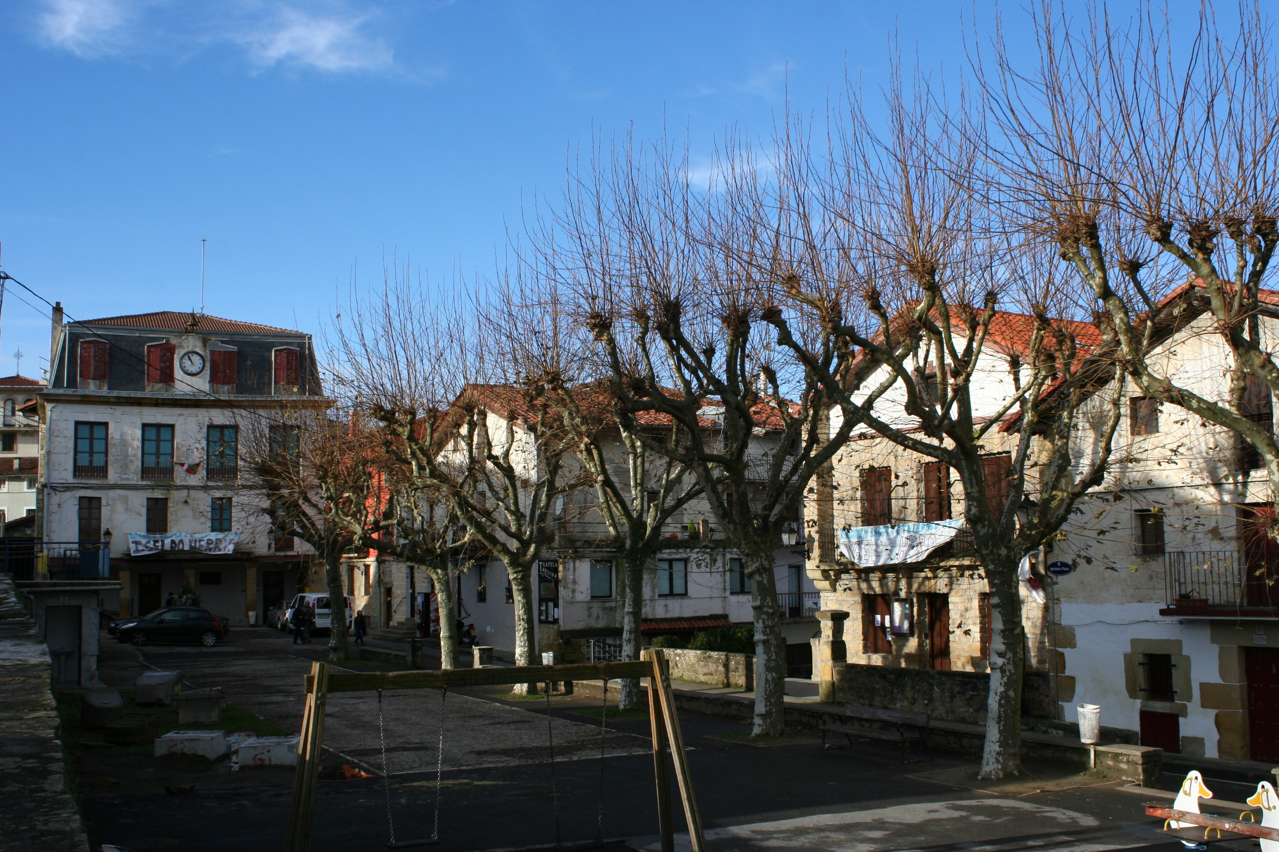 Igeldoko plaza, Kristobal Balentziaga kaletik ikusia (Donostia)